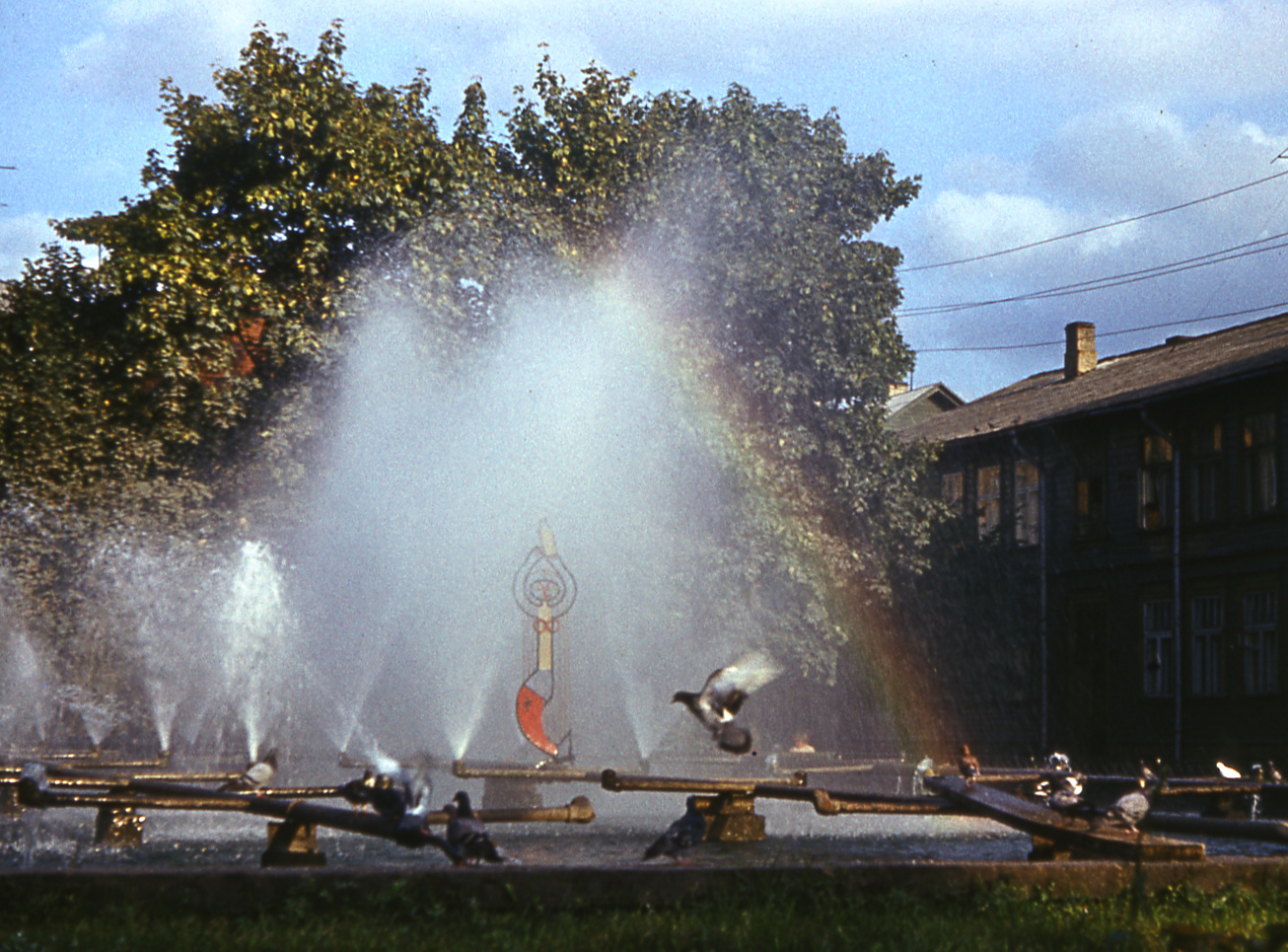 Vikerkaar purskkaevu vihmas.